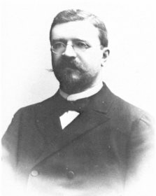 Arkitekt Gustaf Lindgren, ca 1890-talet